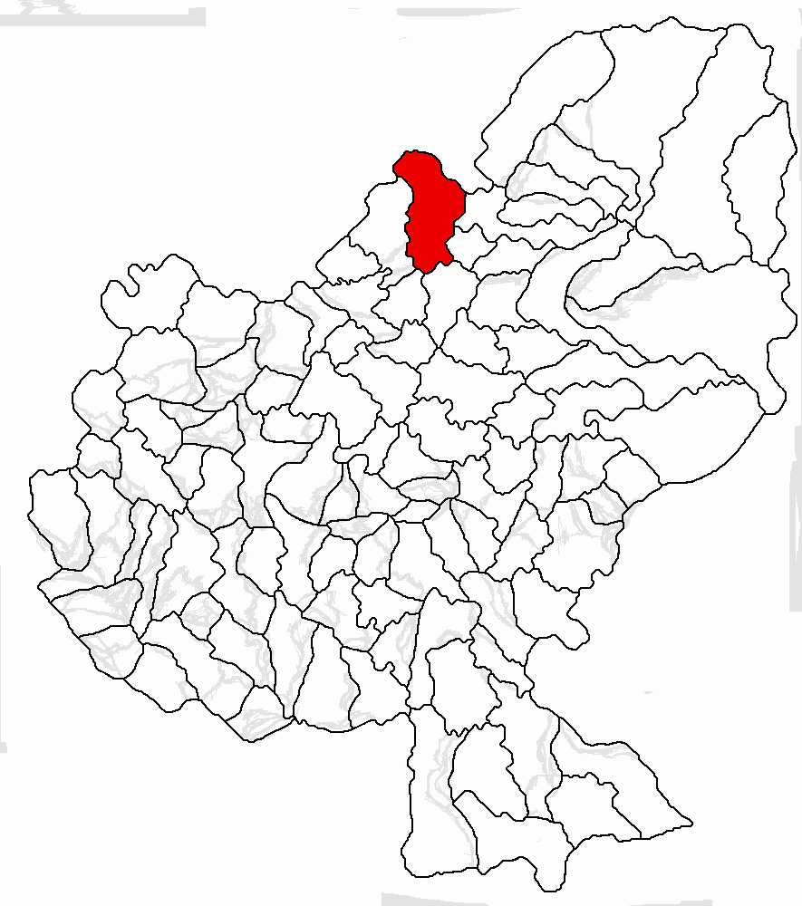 Categorie:Hărţi ale judeţului Mureş